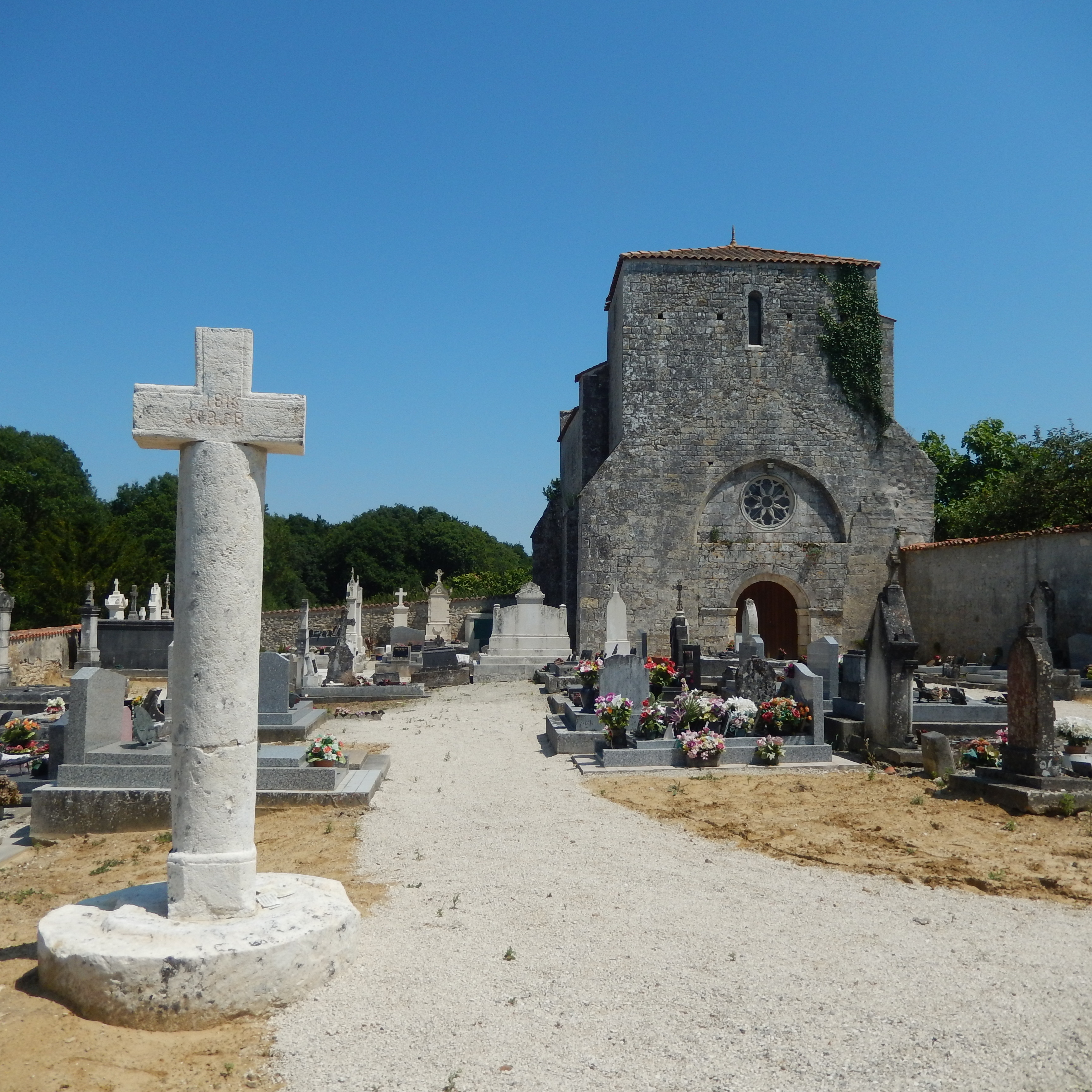 L'église Notre-Dame de l'Assomption, dans le cimetière de Moragne (Charente-Maritime, France). À gauche de l'image, une croix, peut-être un oratoire.